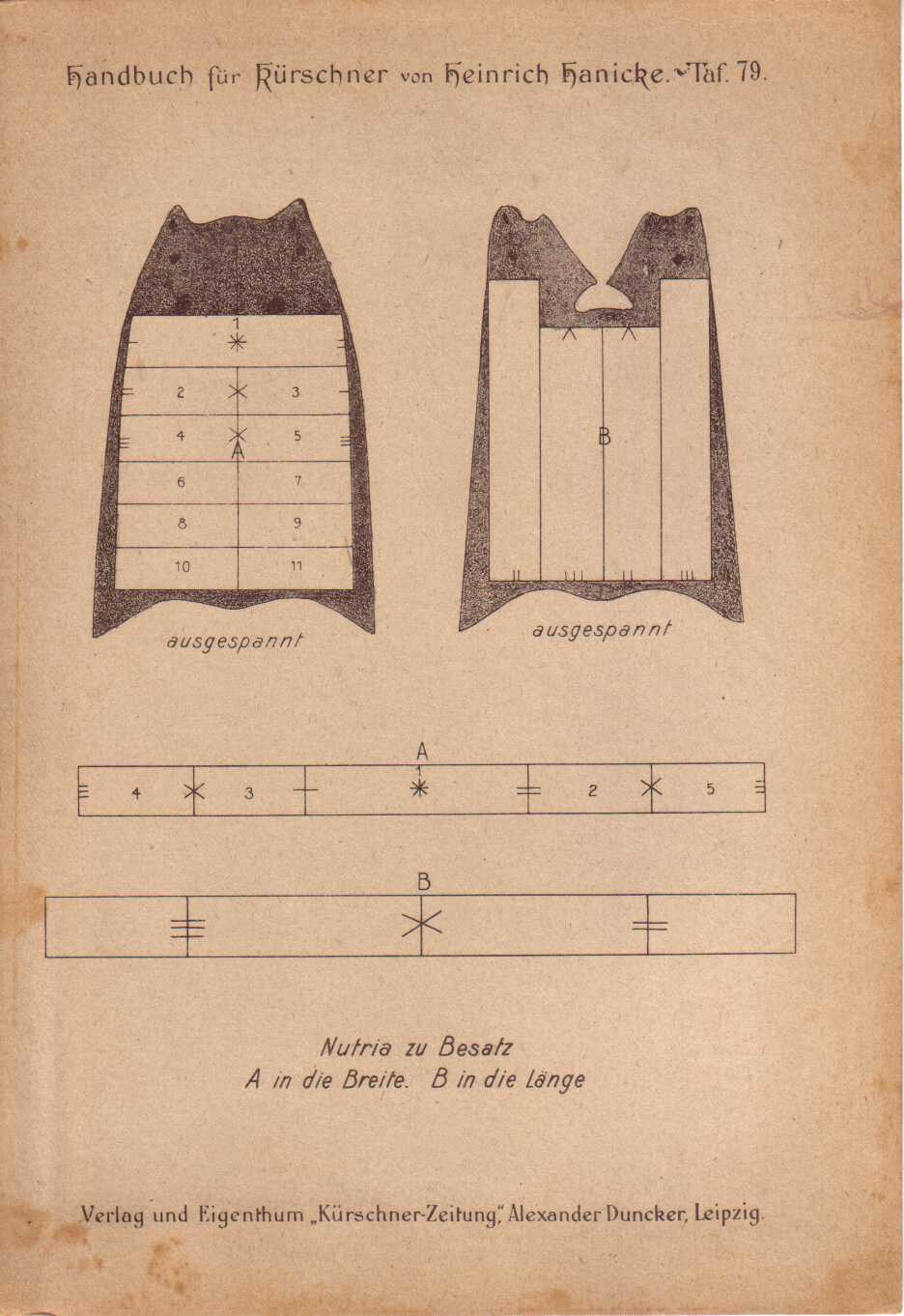 Graphics for Furriers Nutria zu Besatz A in die Breite. B in die Länge